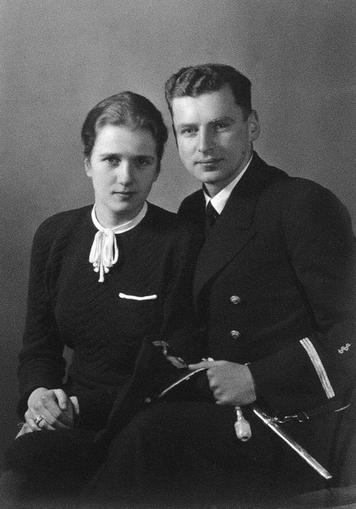 Dr. med. Hans Bernhard Sprung und seine Frau Dora Sprung